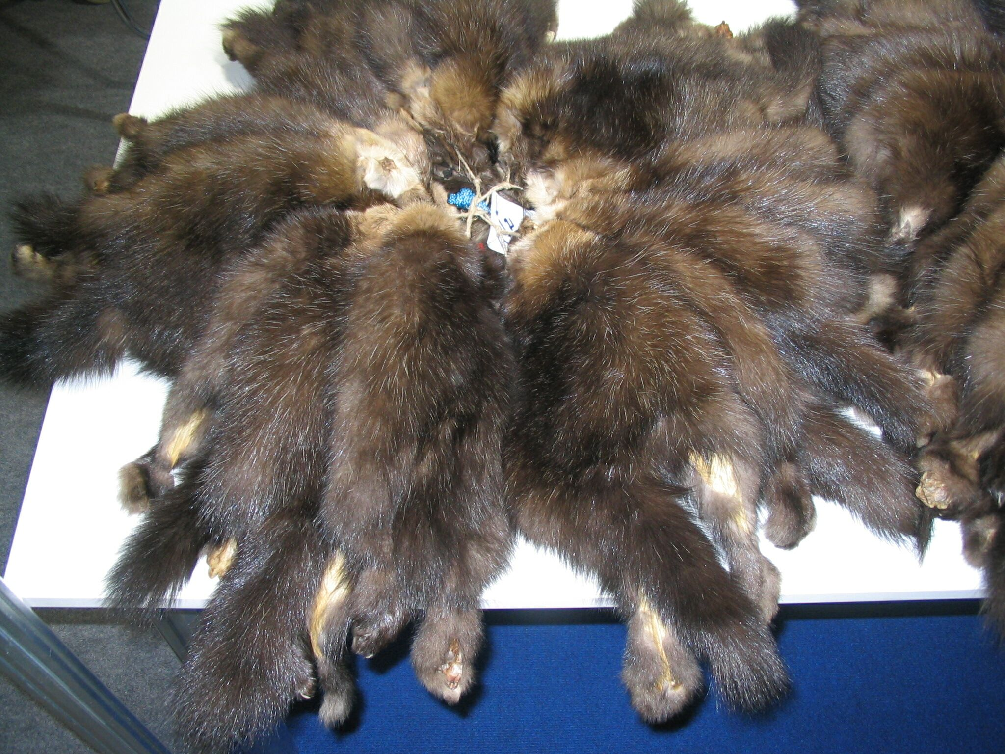 Sable raw-skins, Bargusinsky / Zobelfelle, Provenienz Bargusinsky, in der typischen gestauchten Rohfellform